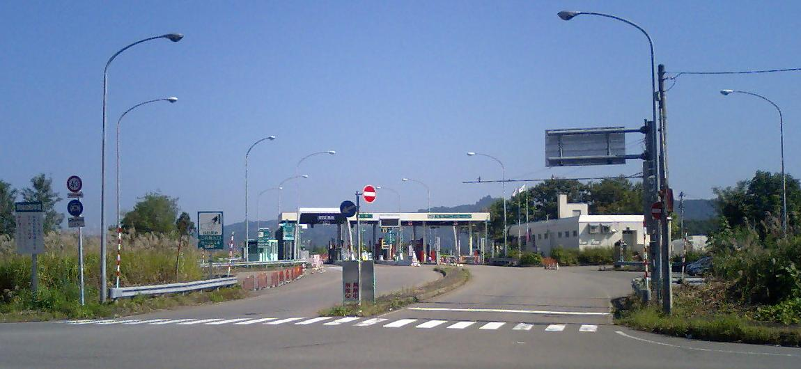 関越自動車道越後川口料金所を接続する新潟県道83号川口塩殿線から 2006年10月04日投稿者本人によって撮影。